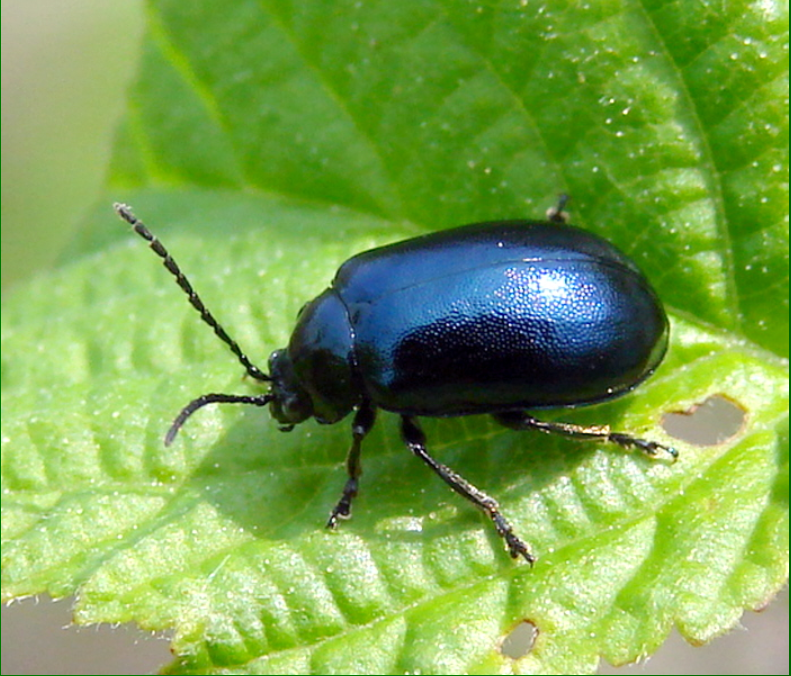 오리나무잎벌레의 사진